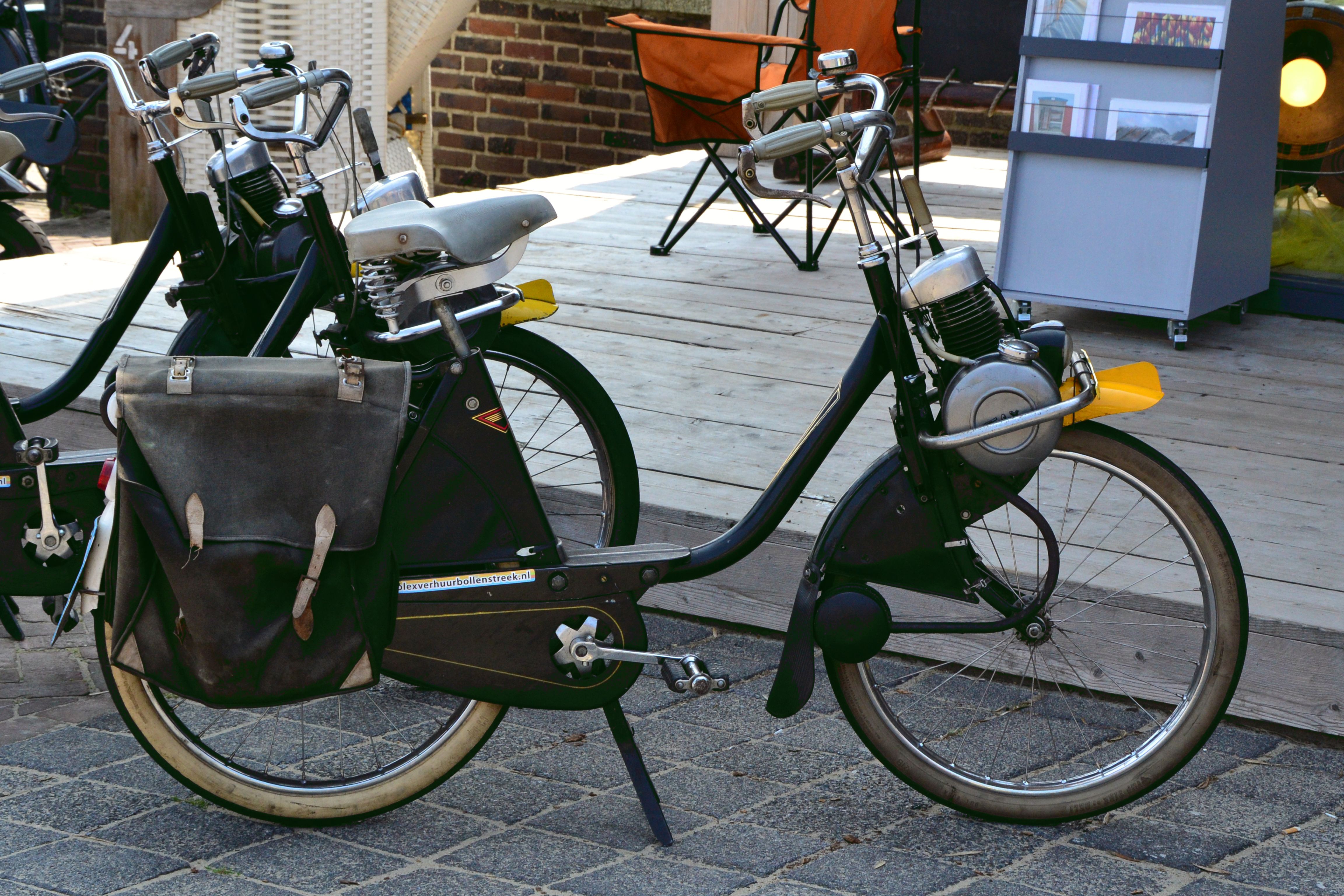 Solex OTO bei Noordwijkerhout, South Holland